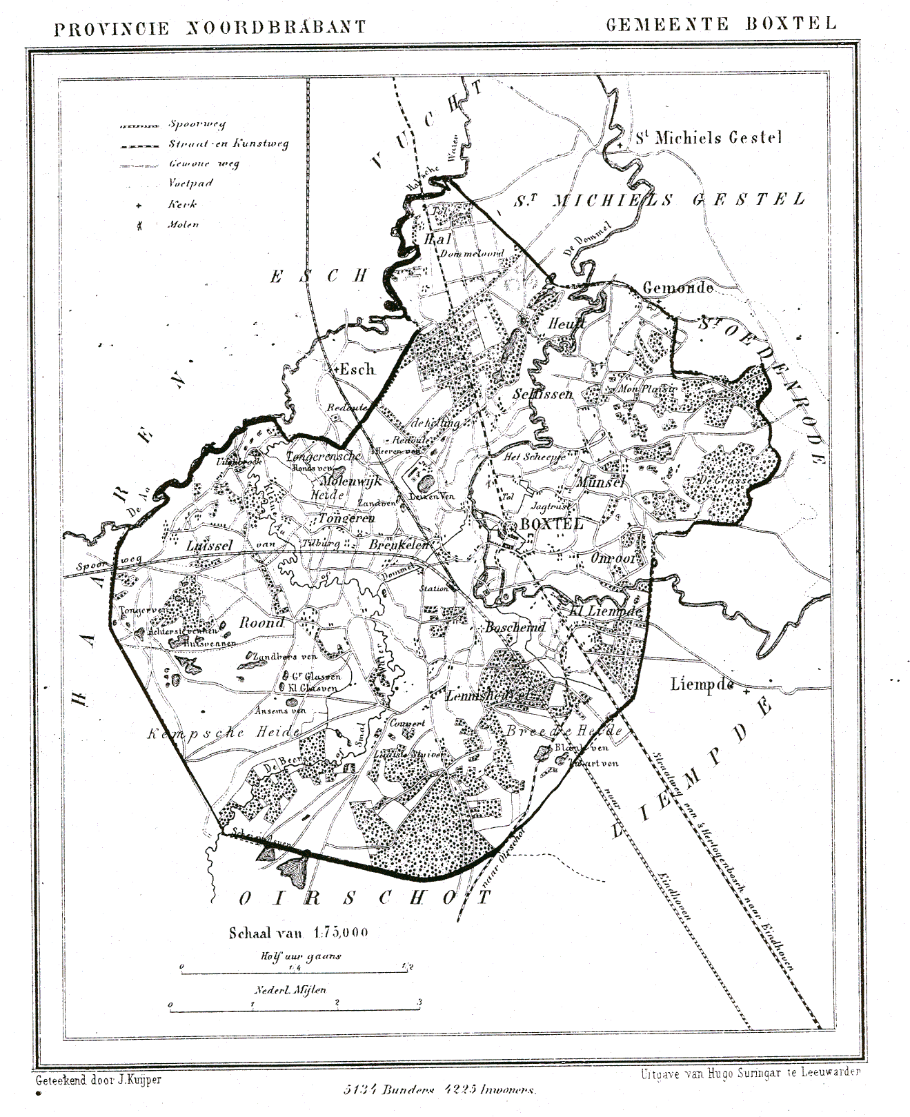 Nederland, Noord-Brabant, Gemeente Boxtel